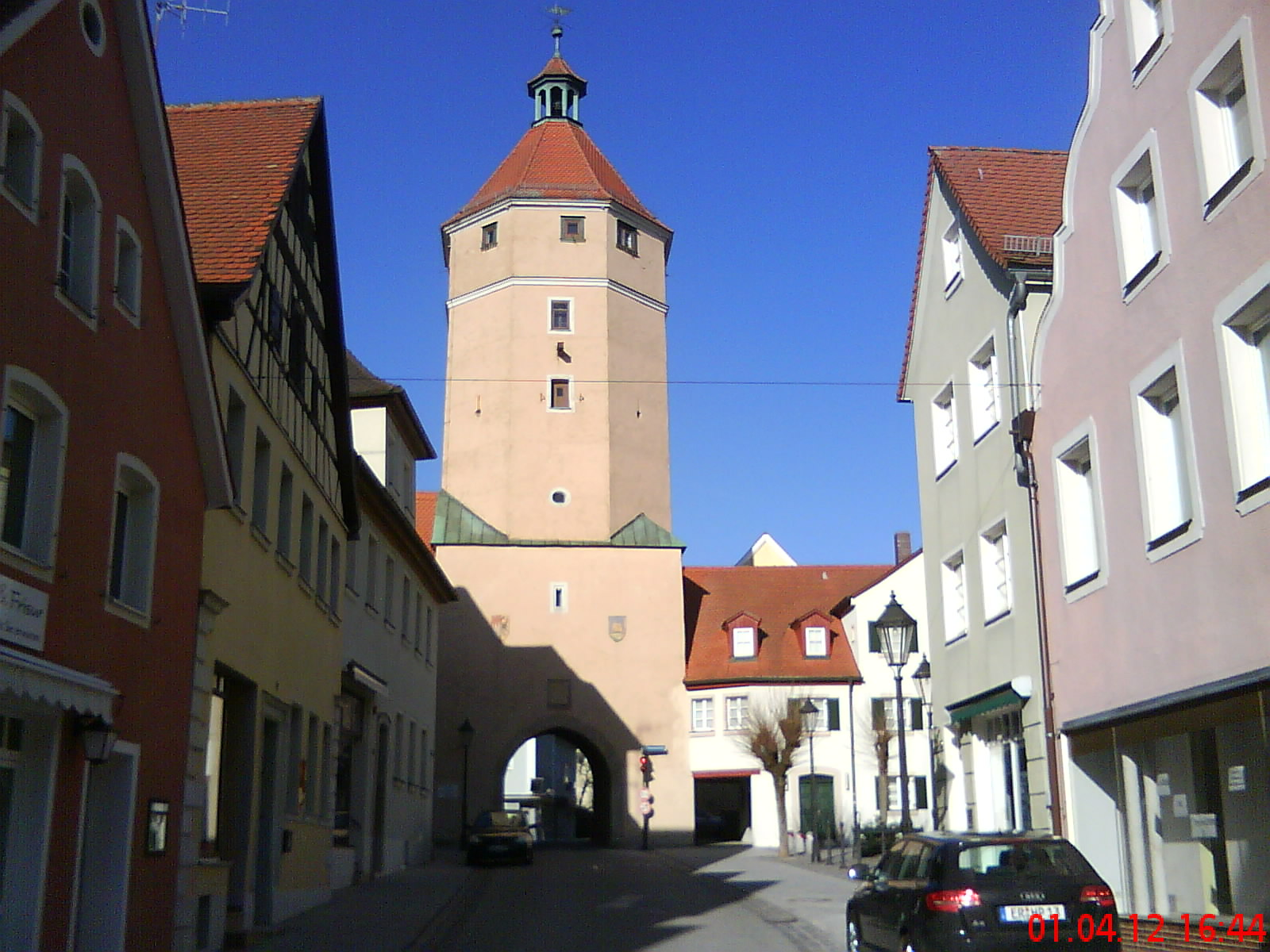 Altstadt Gunzenhausen